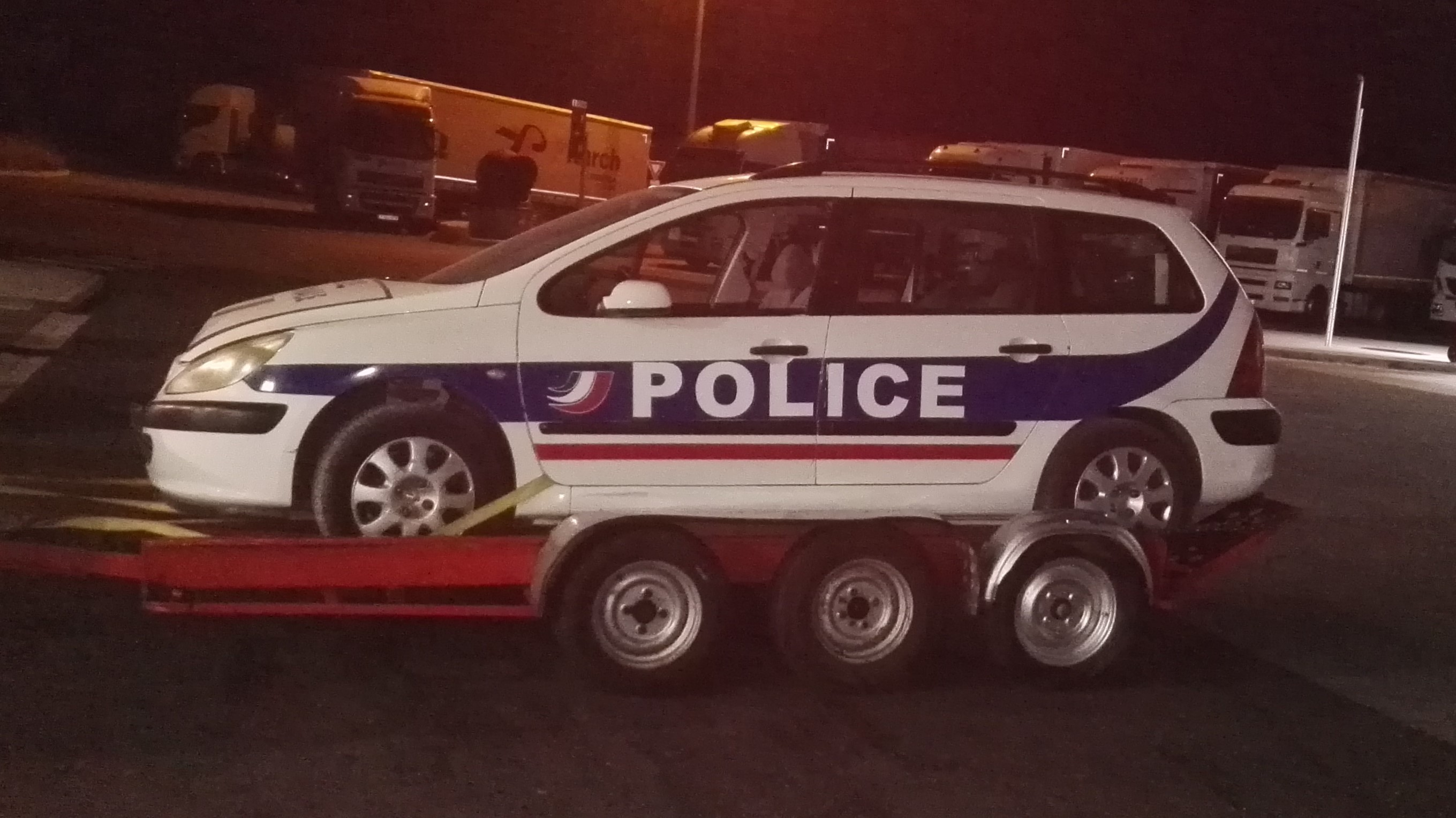 Peugeot 307, 2 litres HDI, de 2003 utilisé pour le tournage de film dont Taxi 5 en novembre 2017.